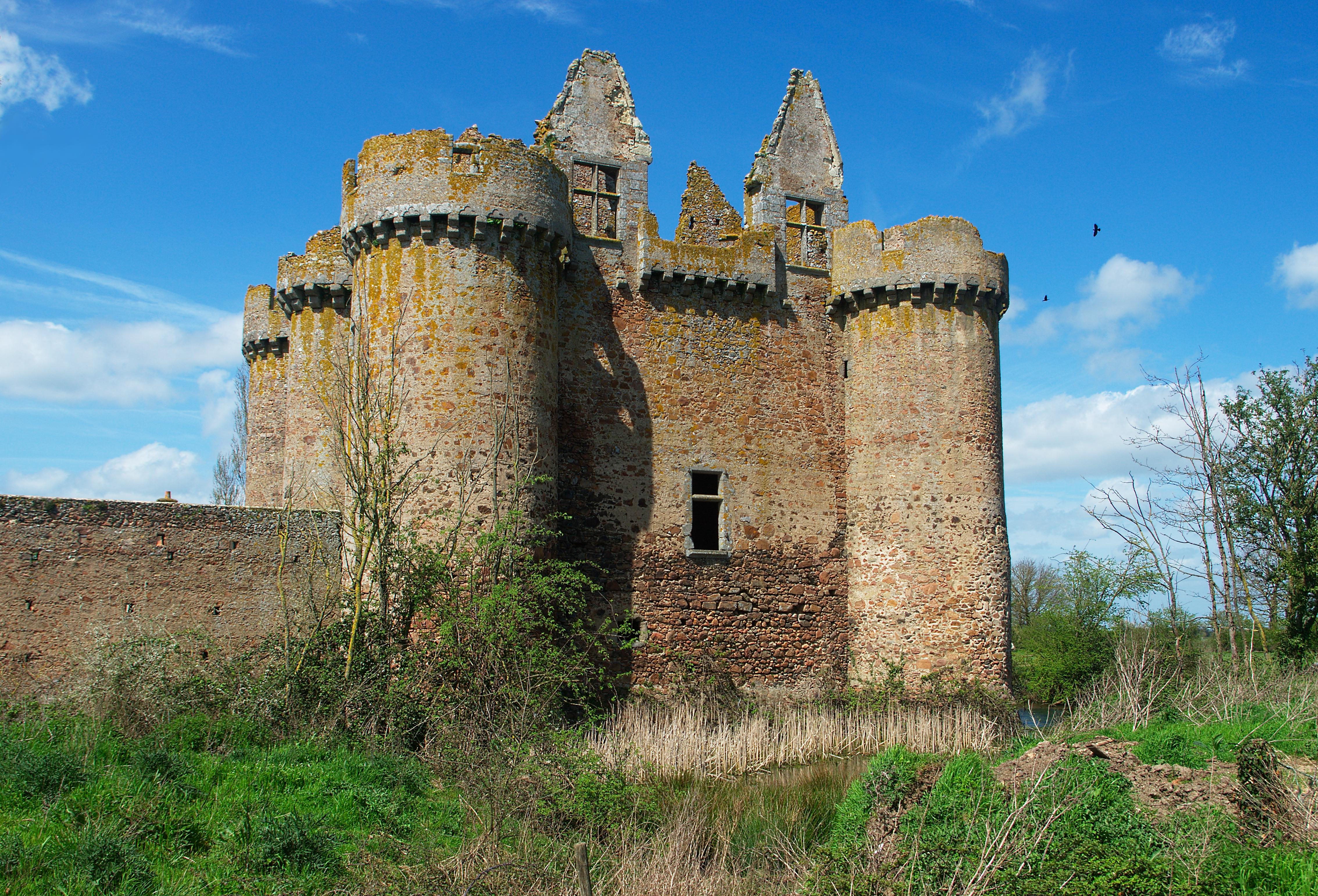 Château de l'Ébaupinay (Classé)